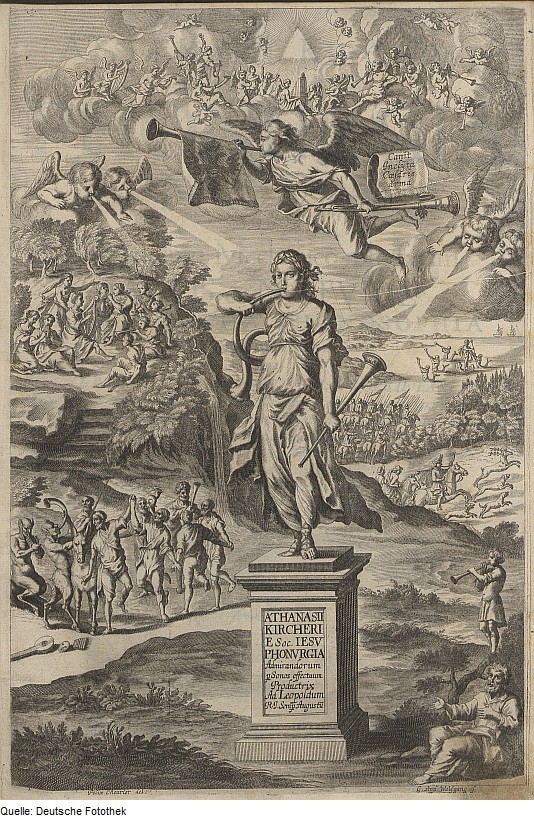 Original image description from the Deutsche Fotothek Akustik & Schall & Instrument